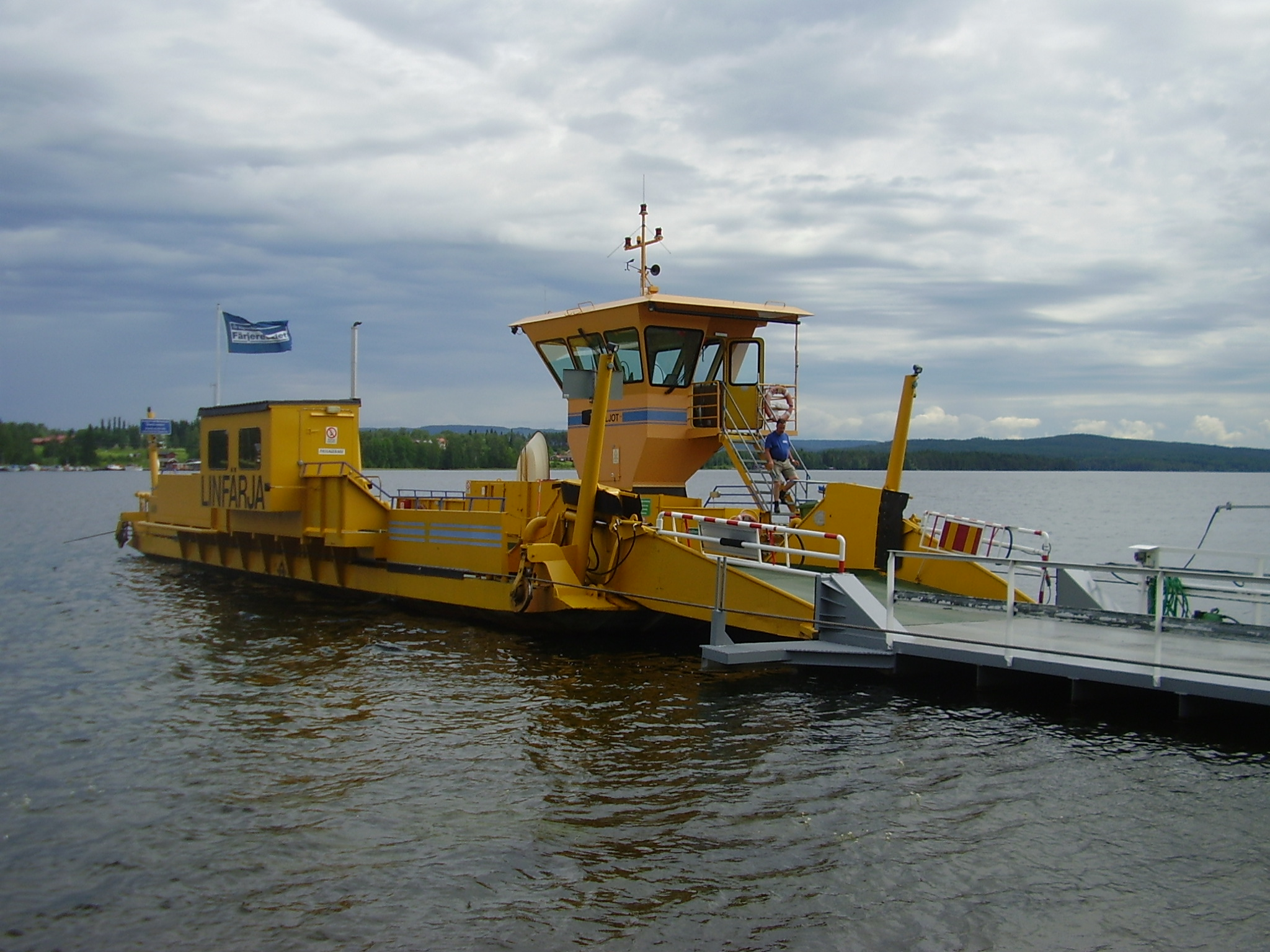 Bilfärjan Arnljot, som går på Ammeröleden i Jämtland